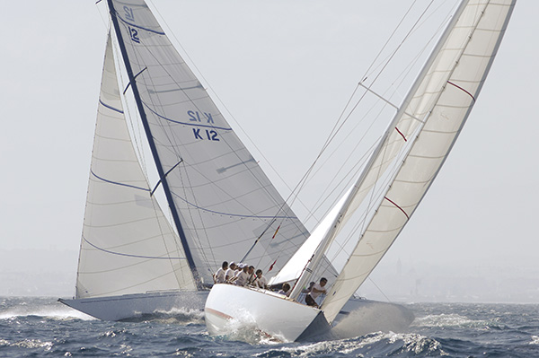 Sovereign and Ikra